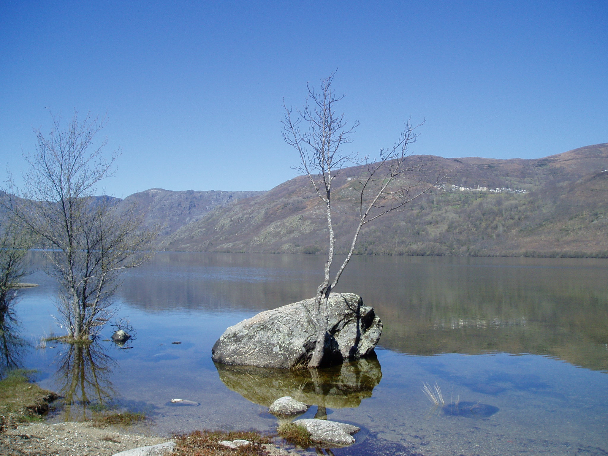 Lago de Sanabria desde la playa de Los Enanos. En la montaña, San Martín de Castañeda.